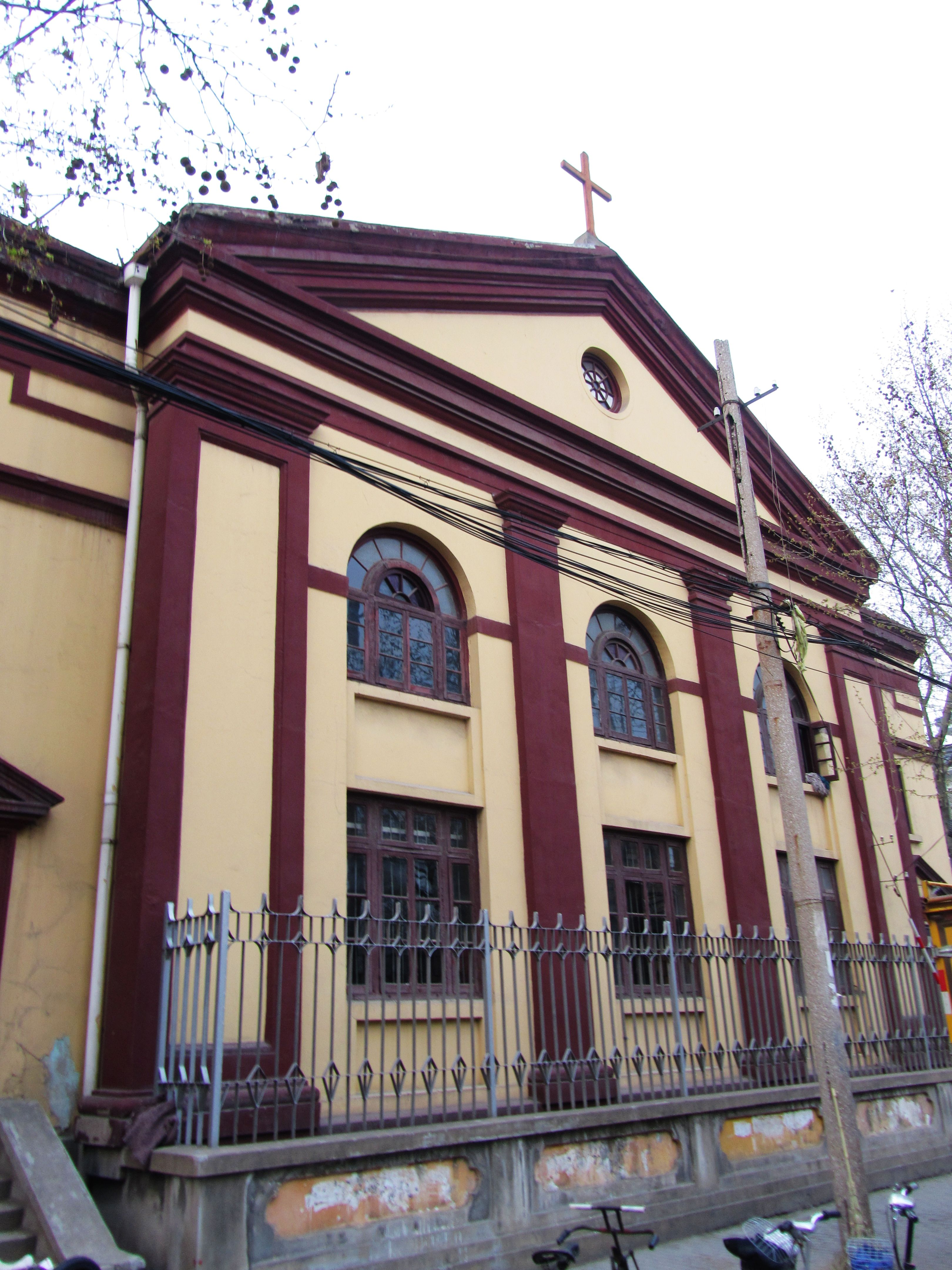 扬州萃园路2号基督教礼拜堂。